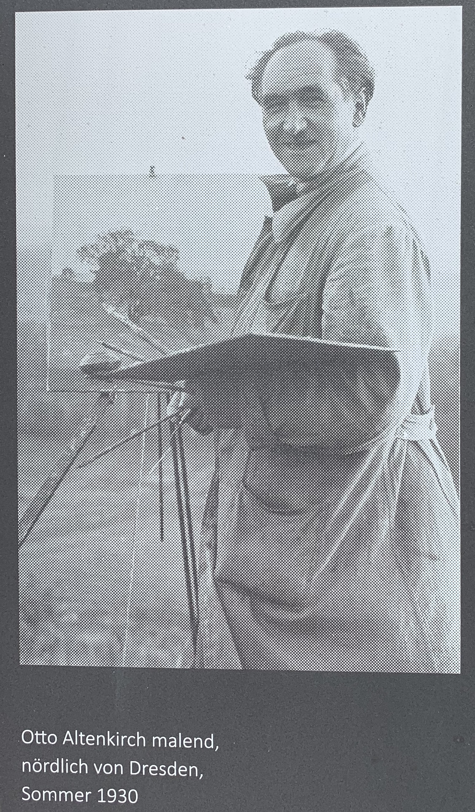 Infosäule mit Abbildung von Otto Altenkirch in Ziesar, Landkreis Potsdam-Mittelmark in Brandenburg. Das Foto wurde auf einer öffentlich zugänglichen Informationssäule der Stadt Ziesar vor dem ehemaligen Geburtshaus aufgenommen.